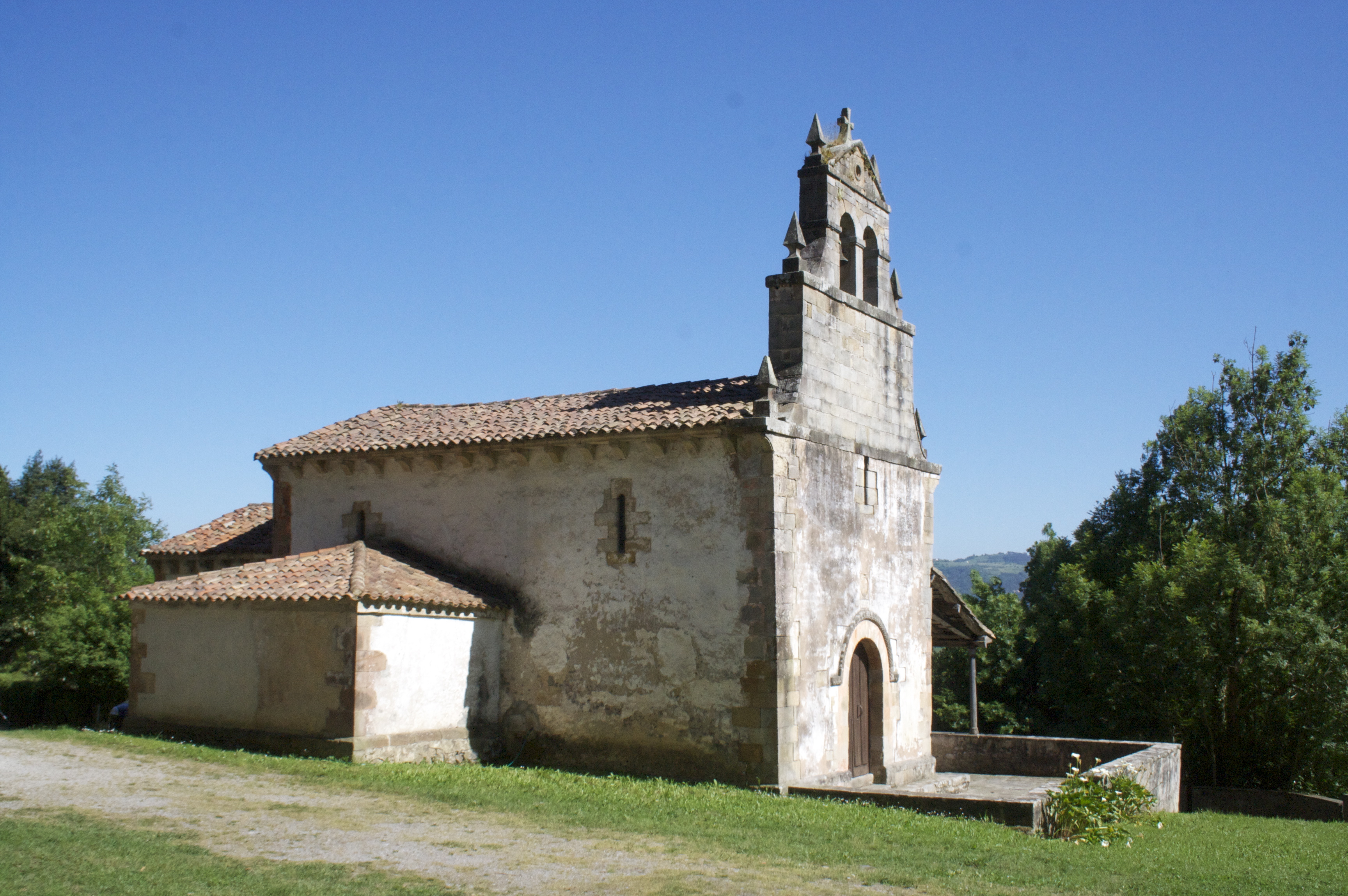 Iglesia de Santa María de Sariegomuerto, concejo de Villaviciosa, Asturias. Iglesia de estilo románico rural catalogada como Bien de Interés cultural